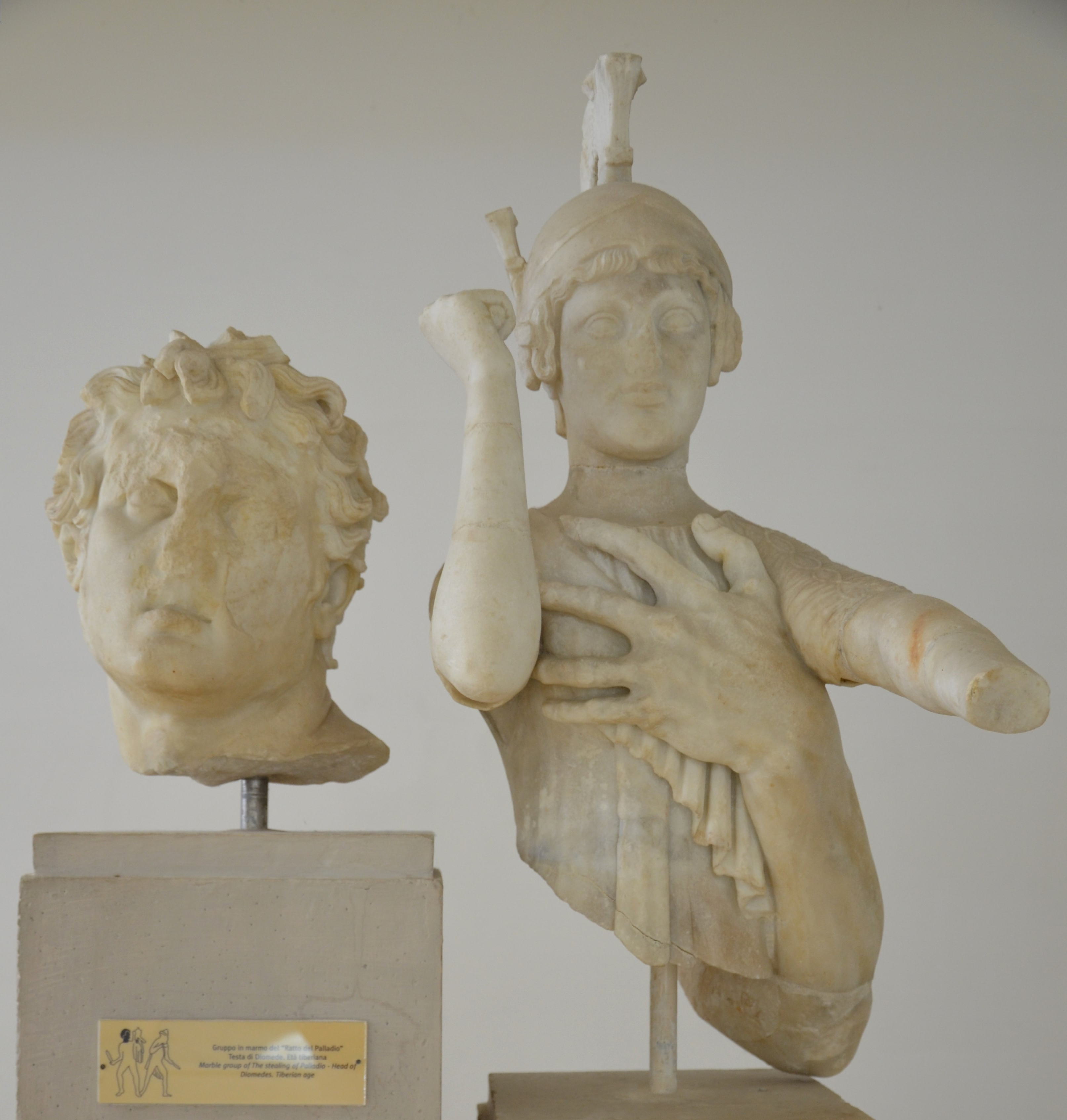 Sperlonga